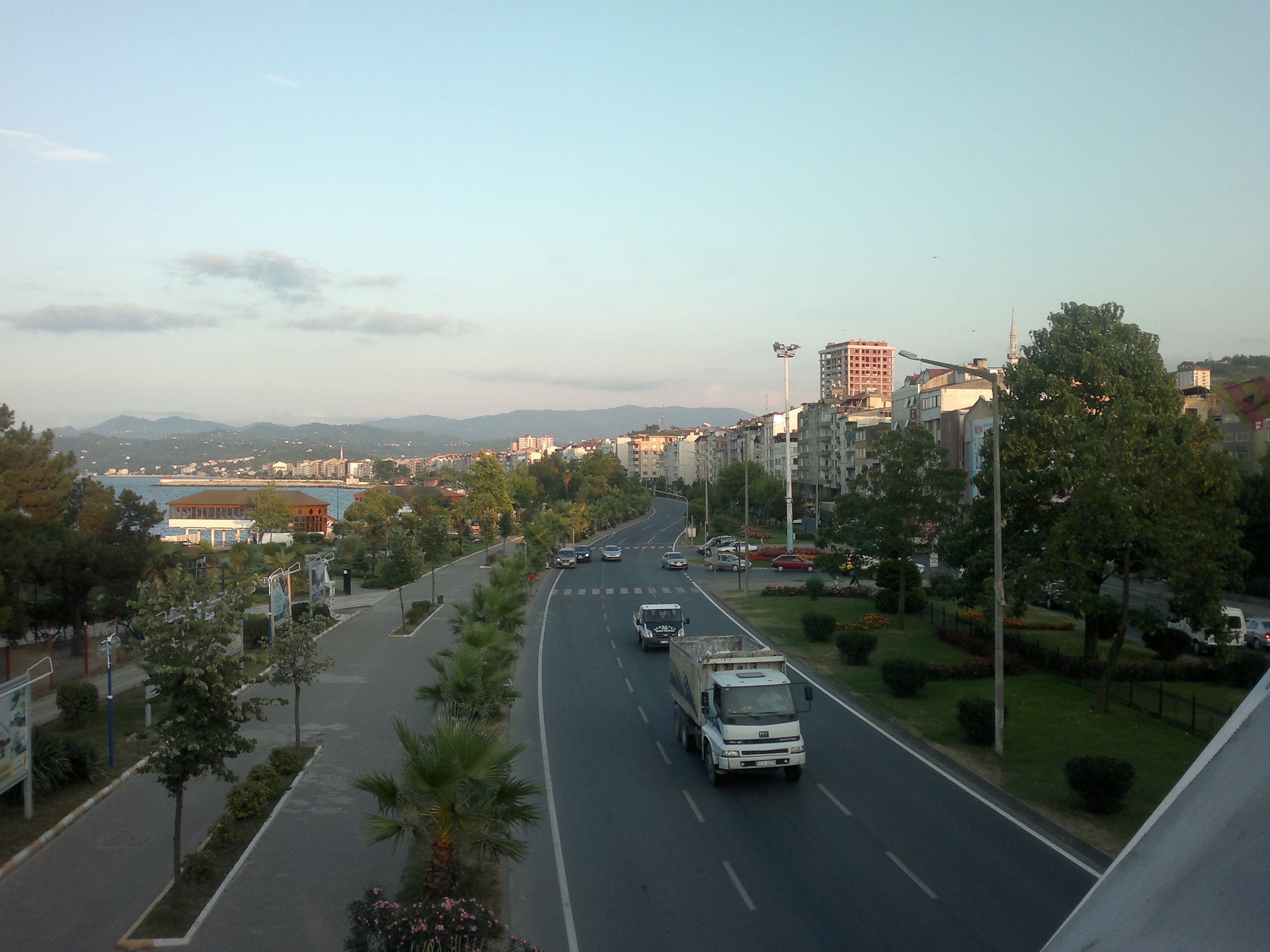 Fatsa Sahil yolu